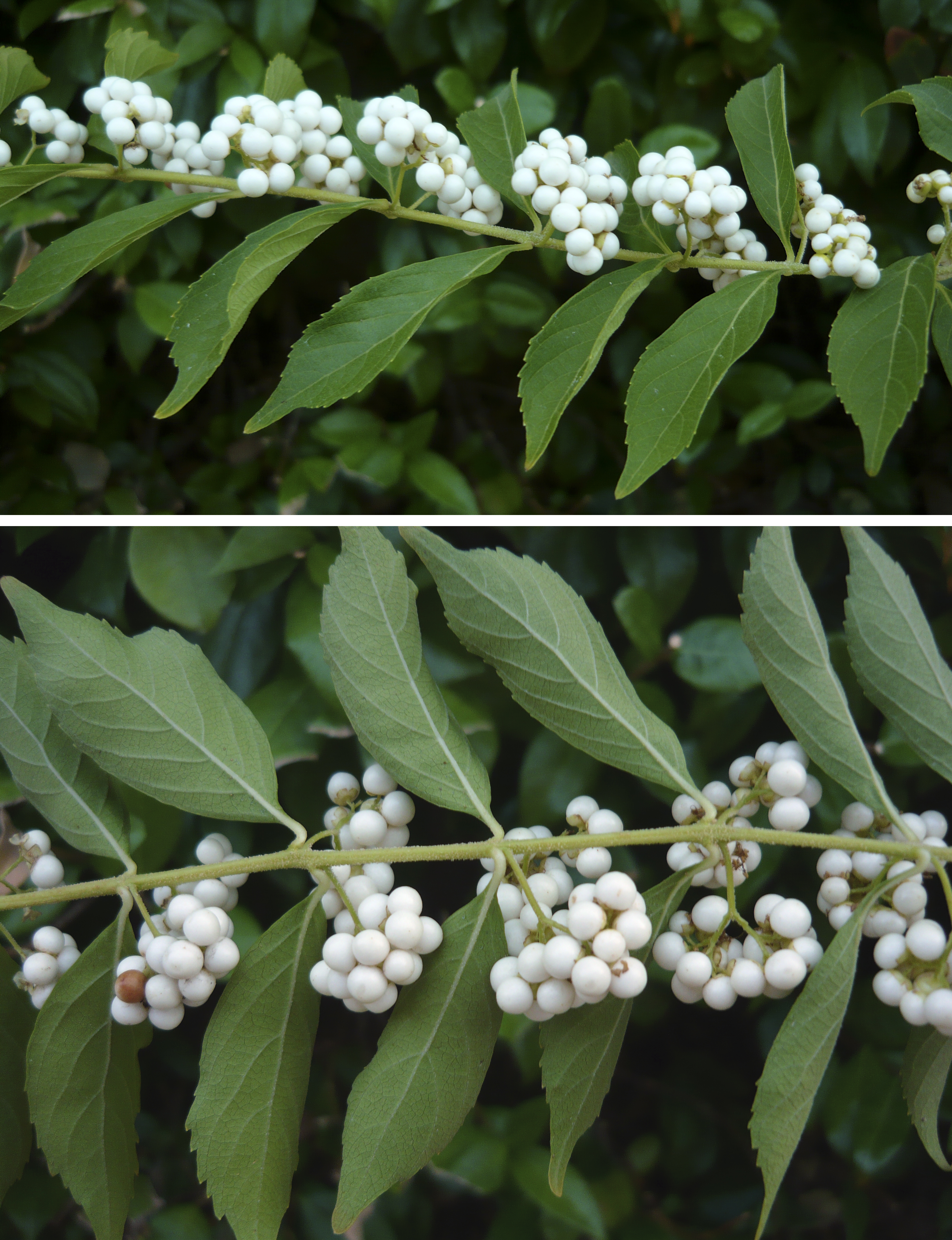 Callicarpa dichotoma 'Albifructus', frutos. Real Jardín Botánico, Madrid.